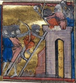 Croisade de Pierre l'Ermite - siège de Nish (1096)